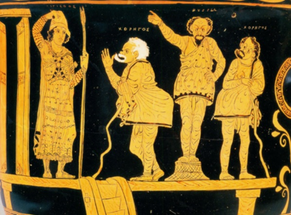 Kostýmy herců vyobrazených na amfoře